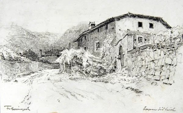 Fritz von Hellingrath Eppan Bauernhaus